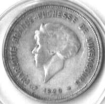 Fënnef-Frang-Steck mat der Grande-Duchesse Charlotte